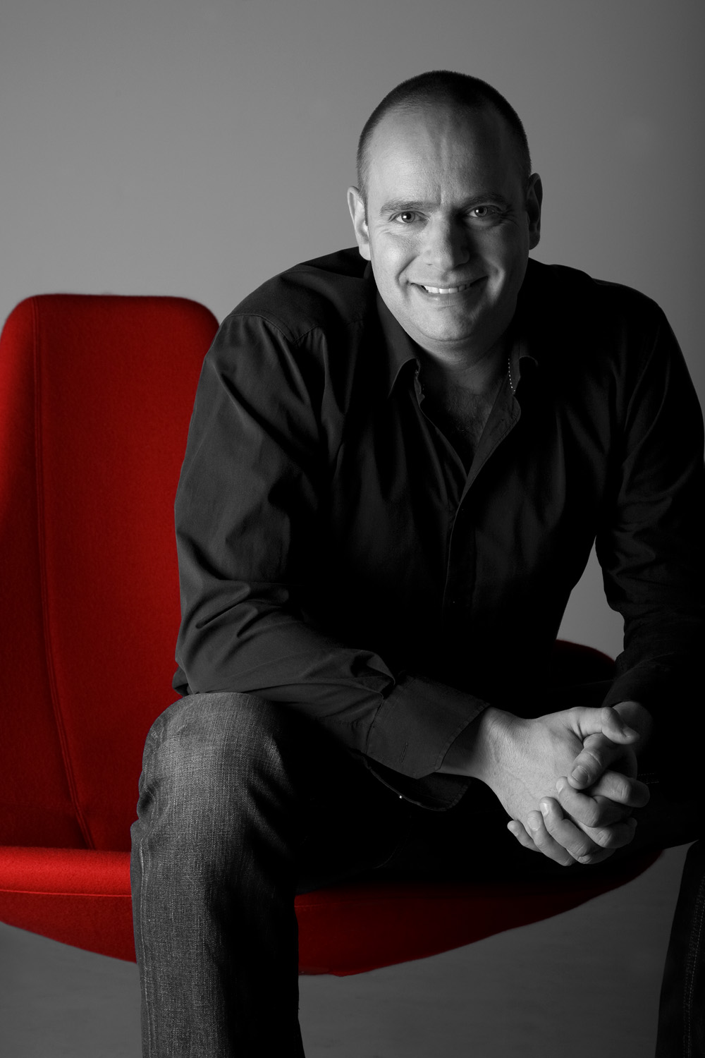 Daniël Smulders